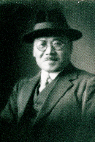 水野広徳（1875 -1945）。日本の海軍軍人、ジャーナリスト。